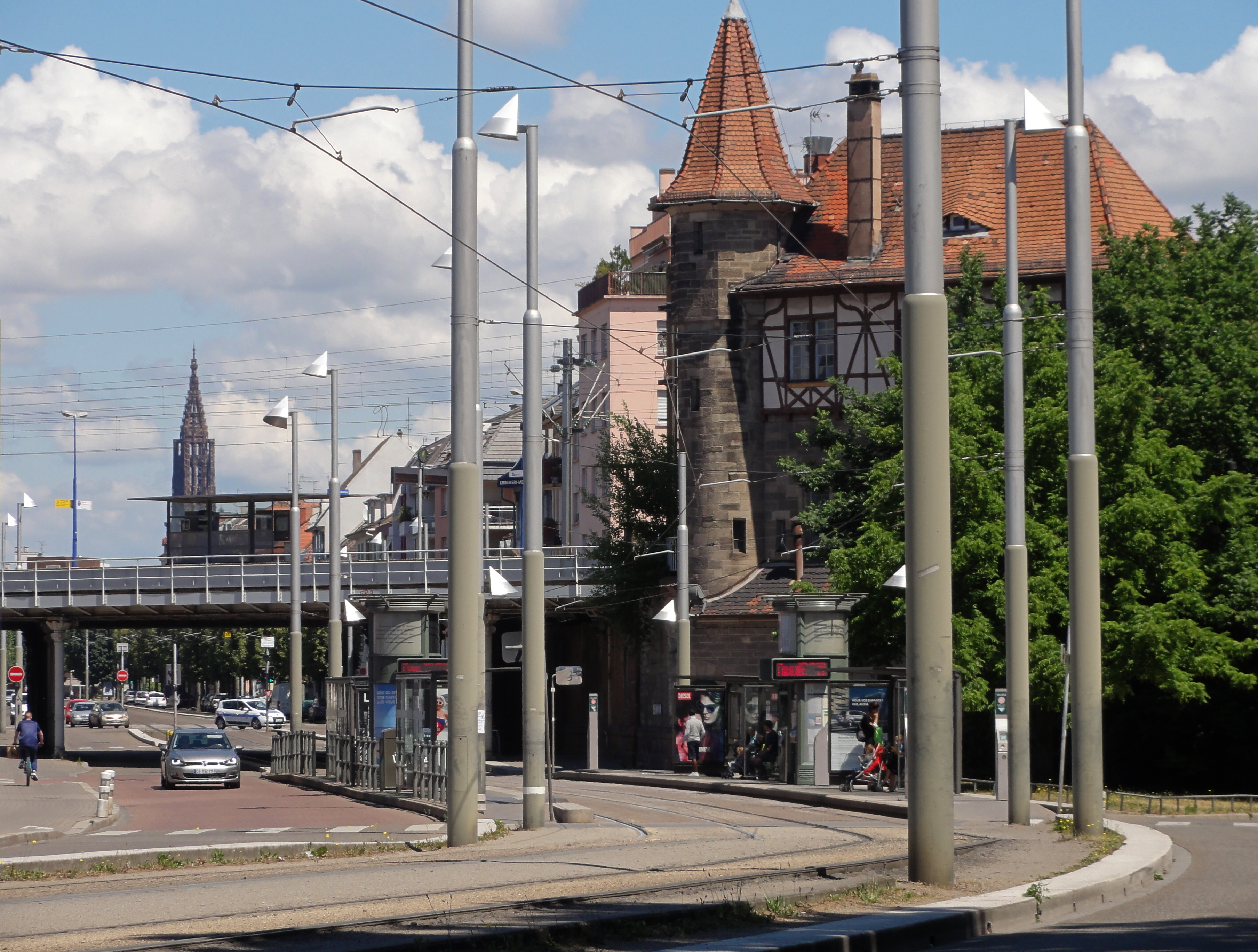 Alsace, Bas-Rhin, Strasbourg-Meinau, Poste d’aiguillage (1905) et station train-tram du Krimmeri.